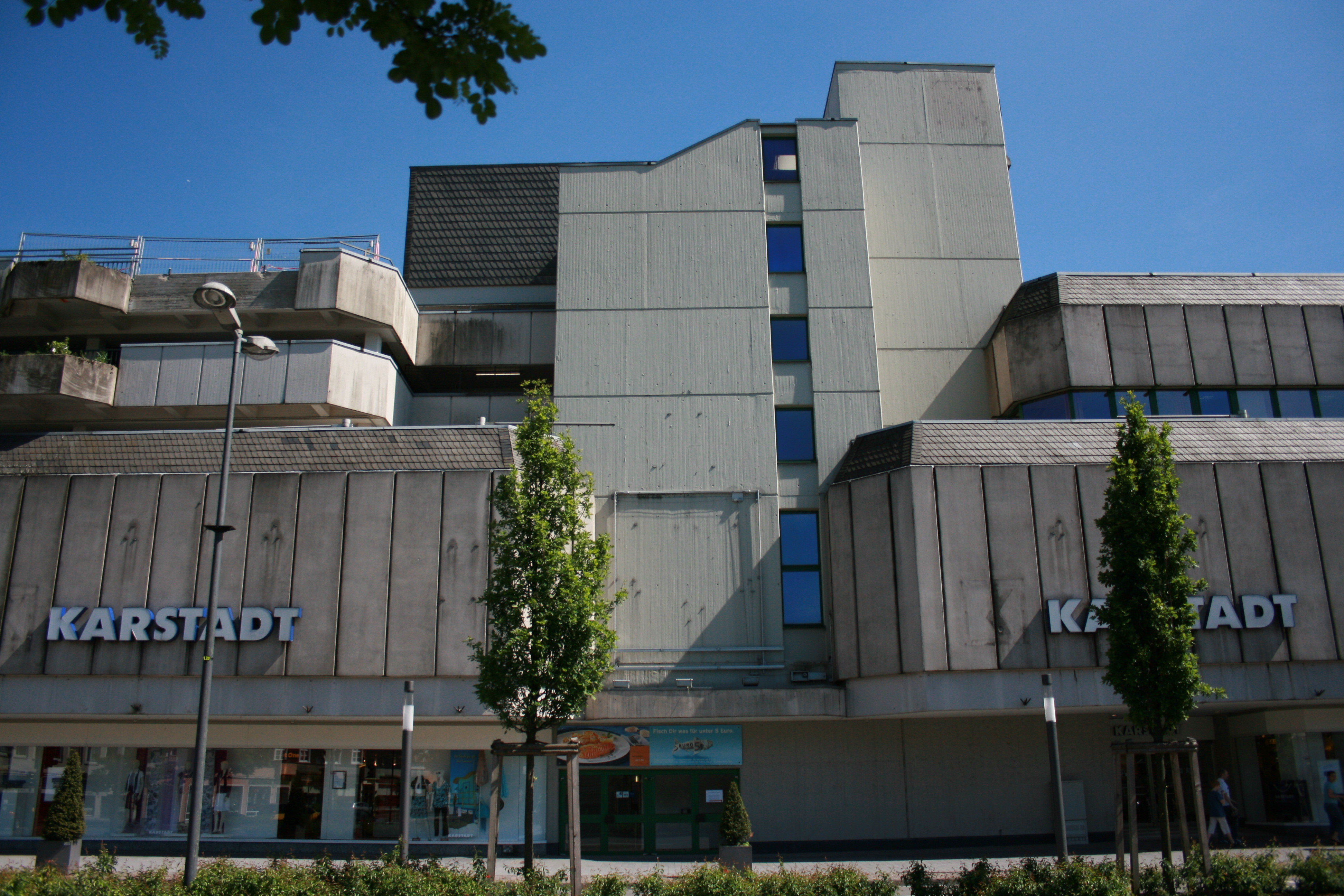 Brückenstraße in Gummersbach